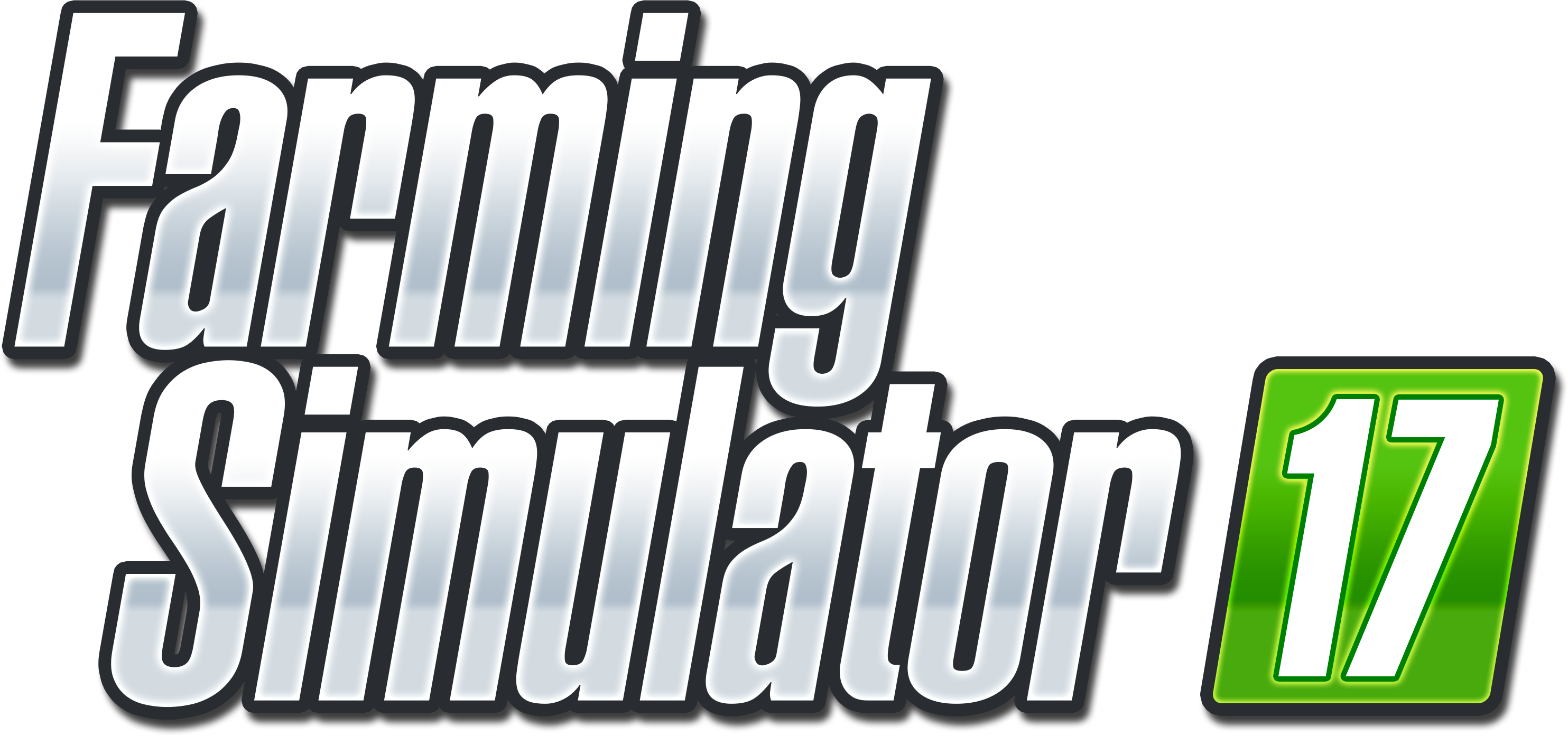 Logo de Farming Simulator 17